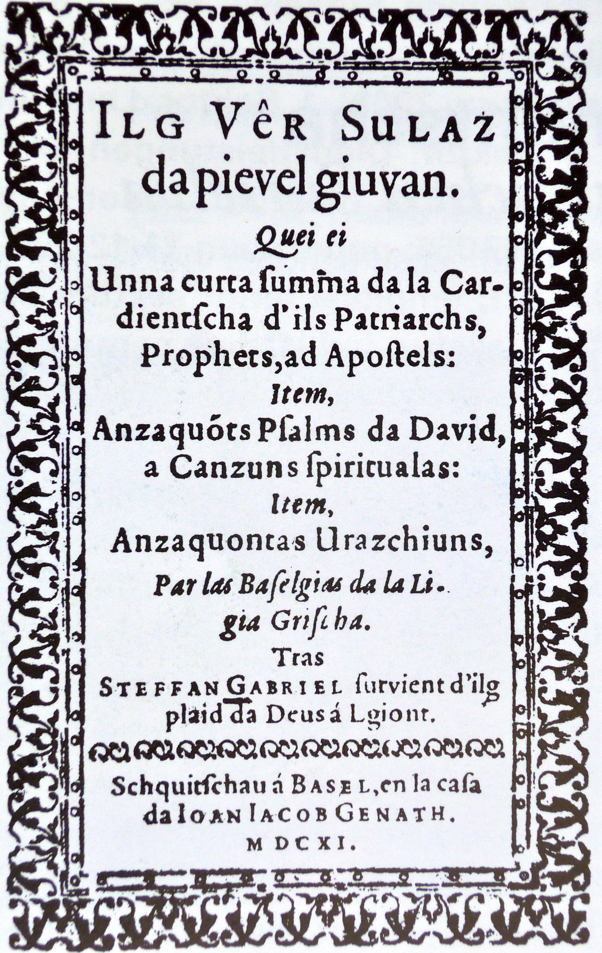 Igl ver sulaz da pievel giuvan; Glaubenslehrbuch in Sursilvan von Steffan Gabriel